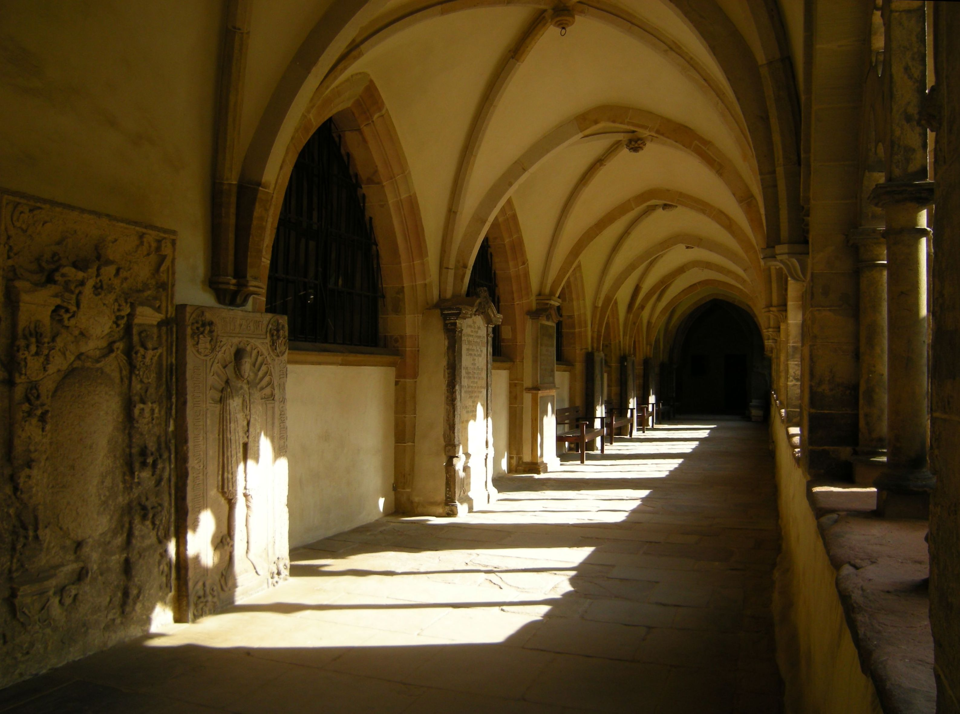 Magdeburg-Kreuzgang im Dom.jpg